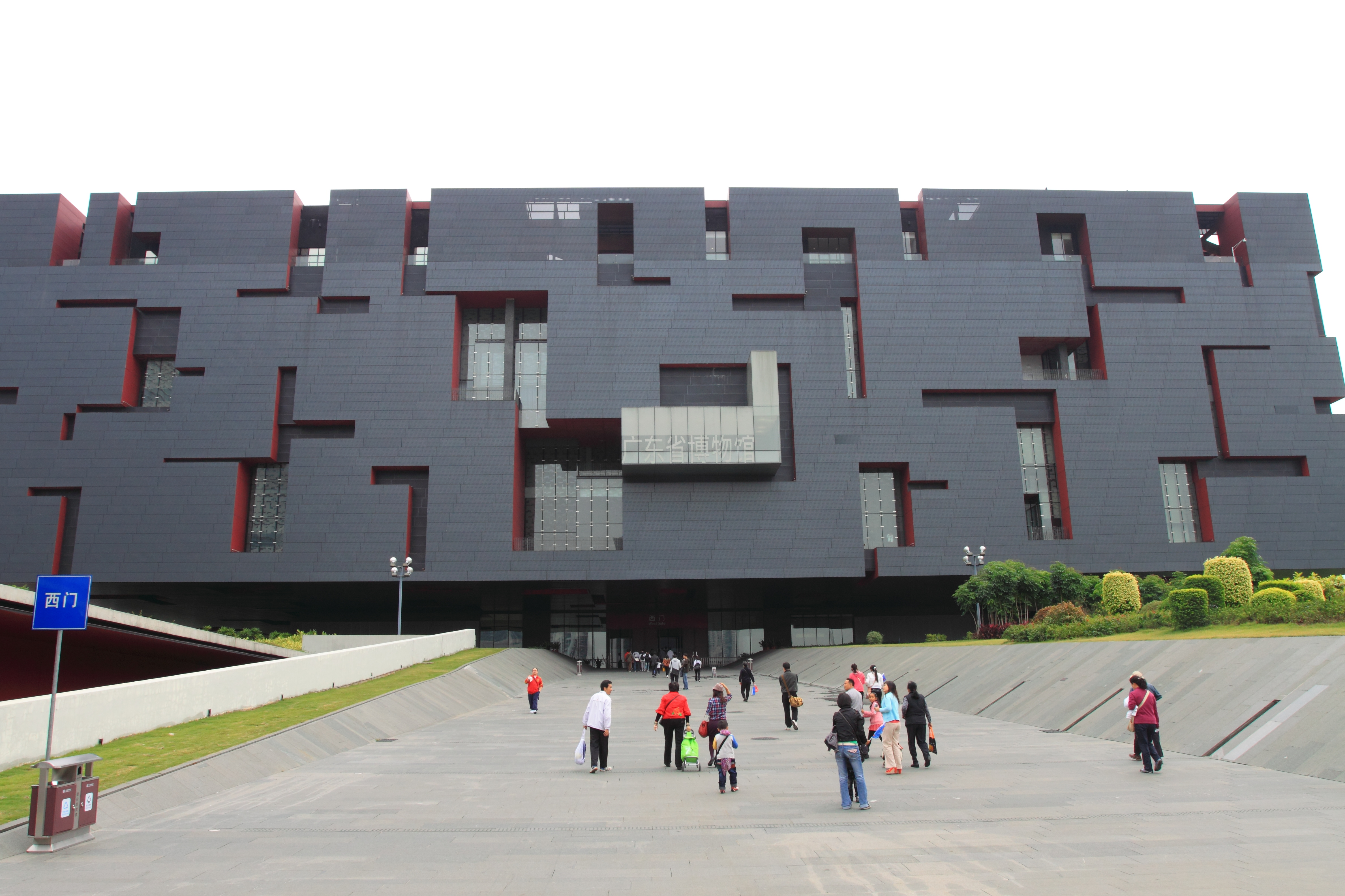 广州珠江新城广东省博物馆新馆 ——